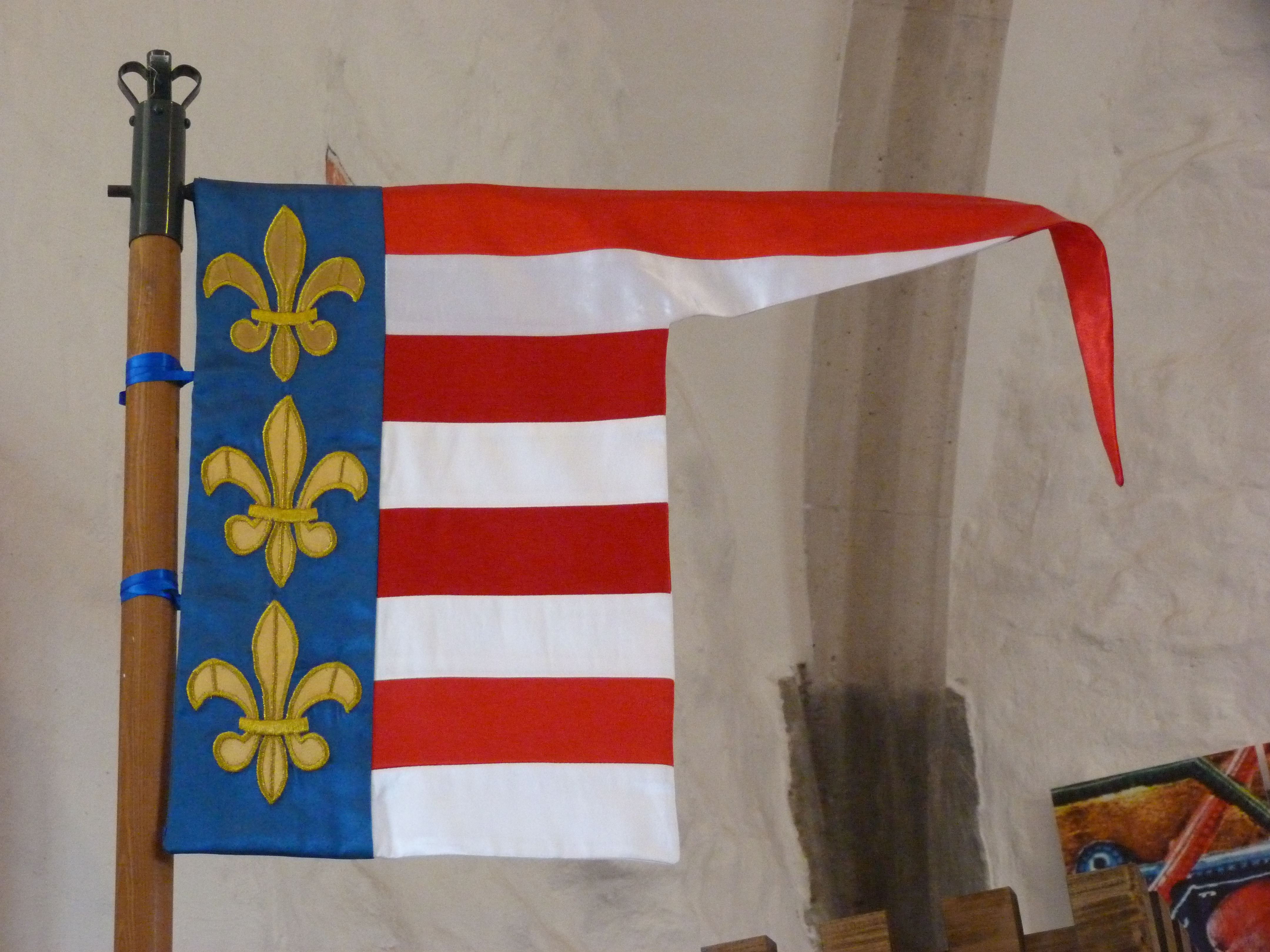 Anjou kori magyar zászló. A felvétel 2015. február 7-én szombaton készült Diósgyőr Várában. ©© Derzsi Elekes Andor, Budapest, 2015, A fénykép másolását és felhasználását a szerző ellenérték nélkül, jogutódjaira is kihatóan megengedi. Az engedély kiterjed a kereskedelmi célú hasznosításra is. Kéri azonban nevének feltüntetését a felhasználás során. A Metapolisz sorozat valamennyi képe és filmje Creative Commons alatti valamint kereskedelmi - for profit - célra is felhasználható. Ajánlott hivatkozás: Derzsi Elekes Andor: Metapolisz DVD line